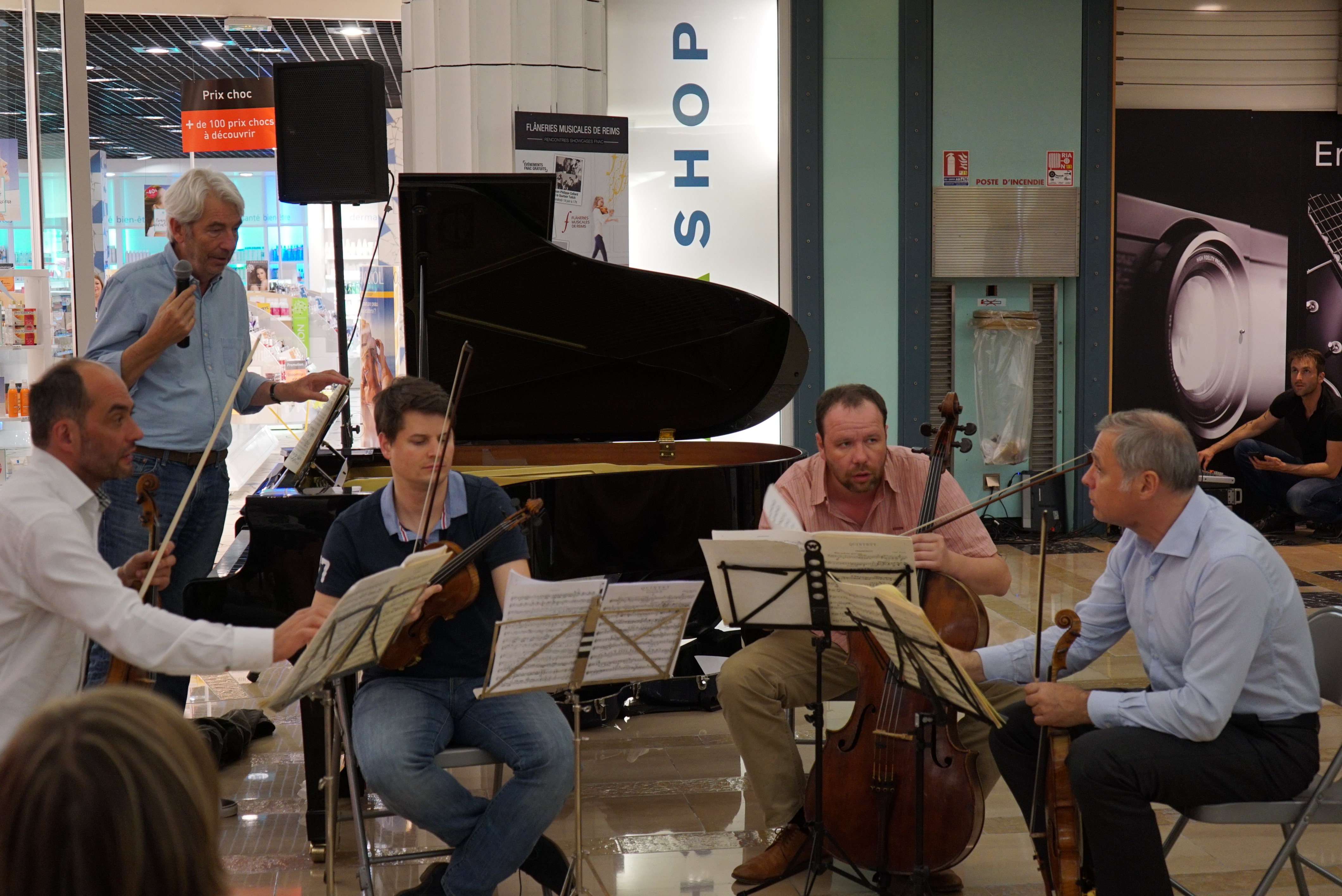 lors de "Flâneries musicales " de 2015.